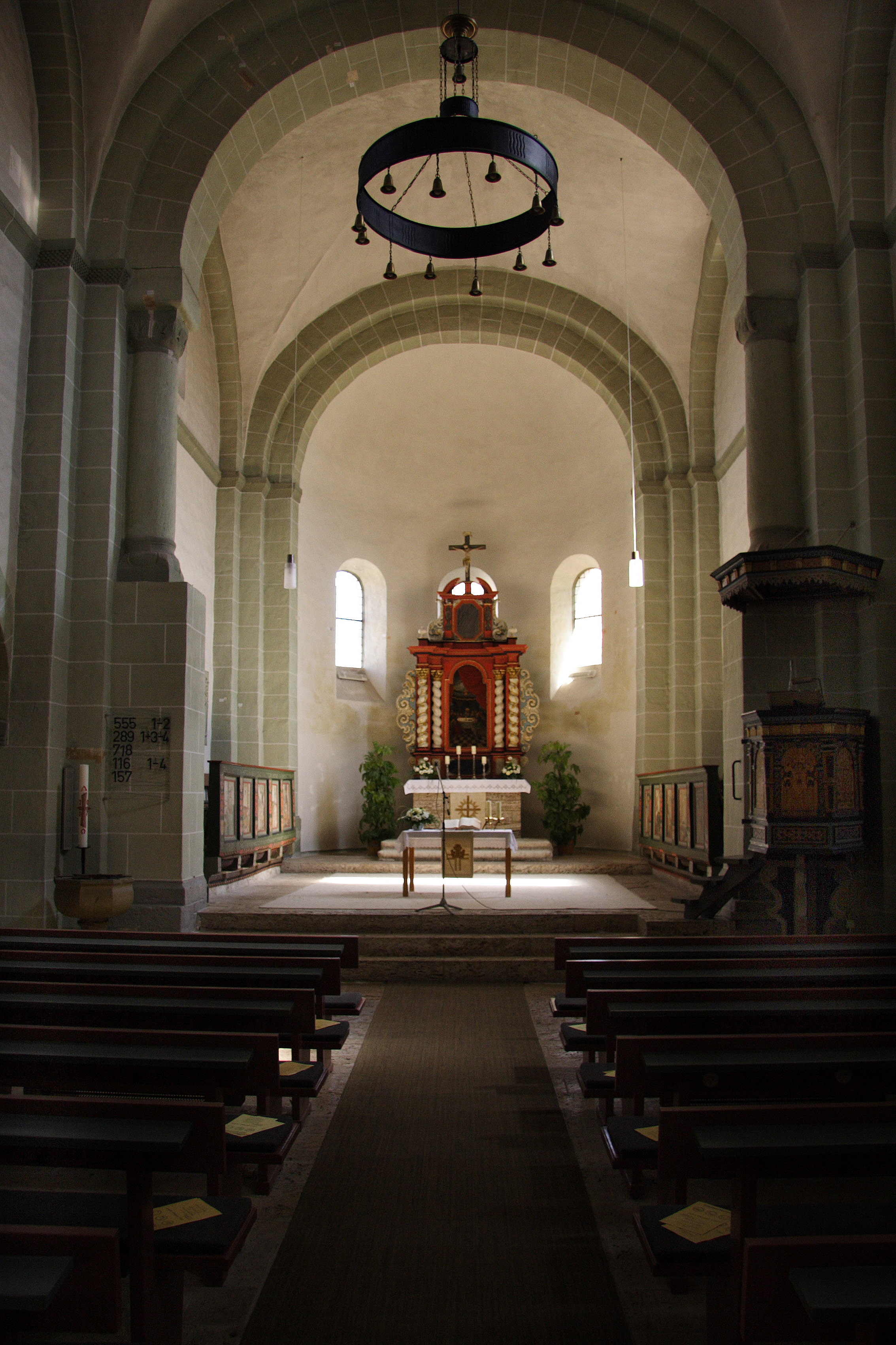 Kirchenraum der evangelischen Kirche in Adorf (Diemelsee)